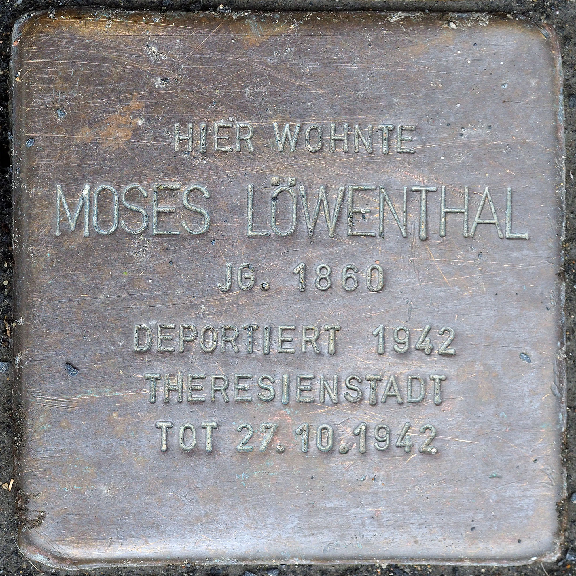 Stolpersteine GV: Löwenthal Moses